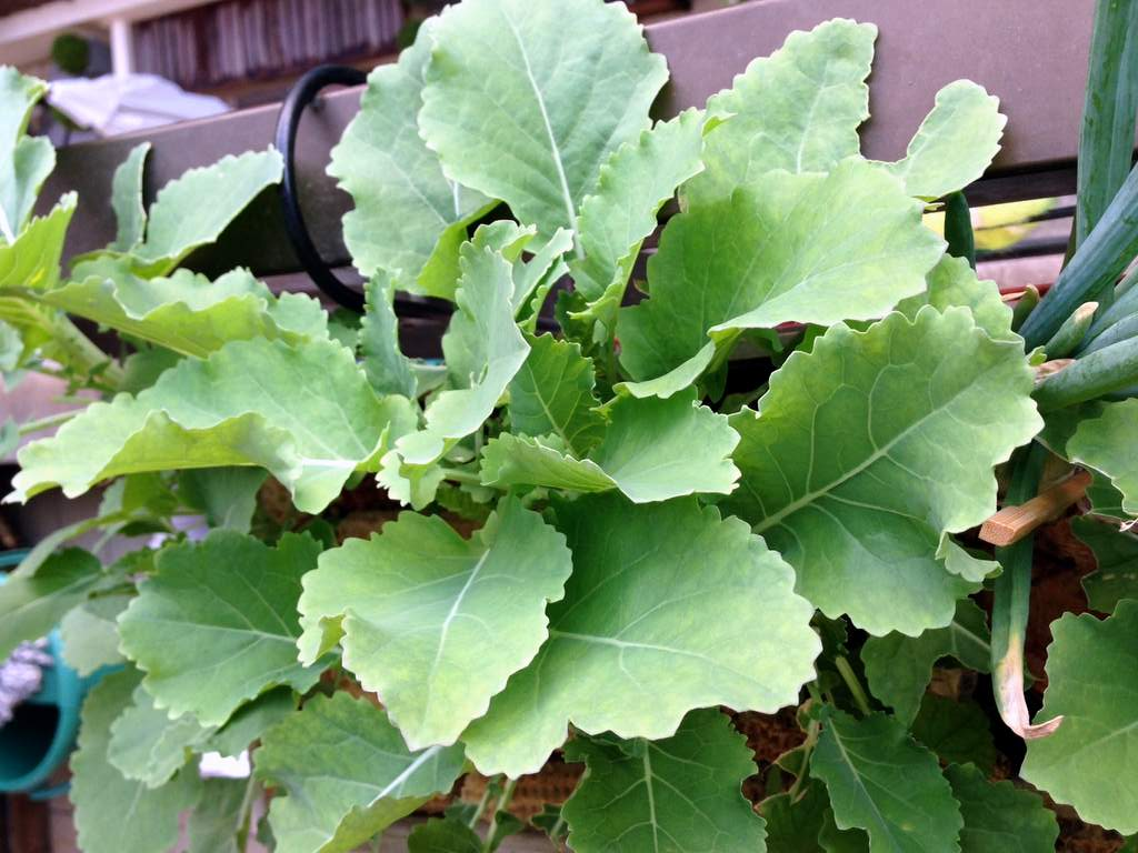 Chou vivace ou chou de Daubenton